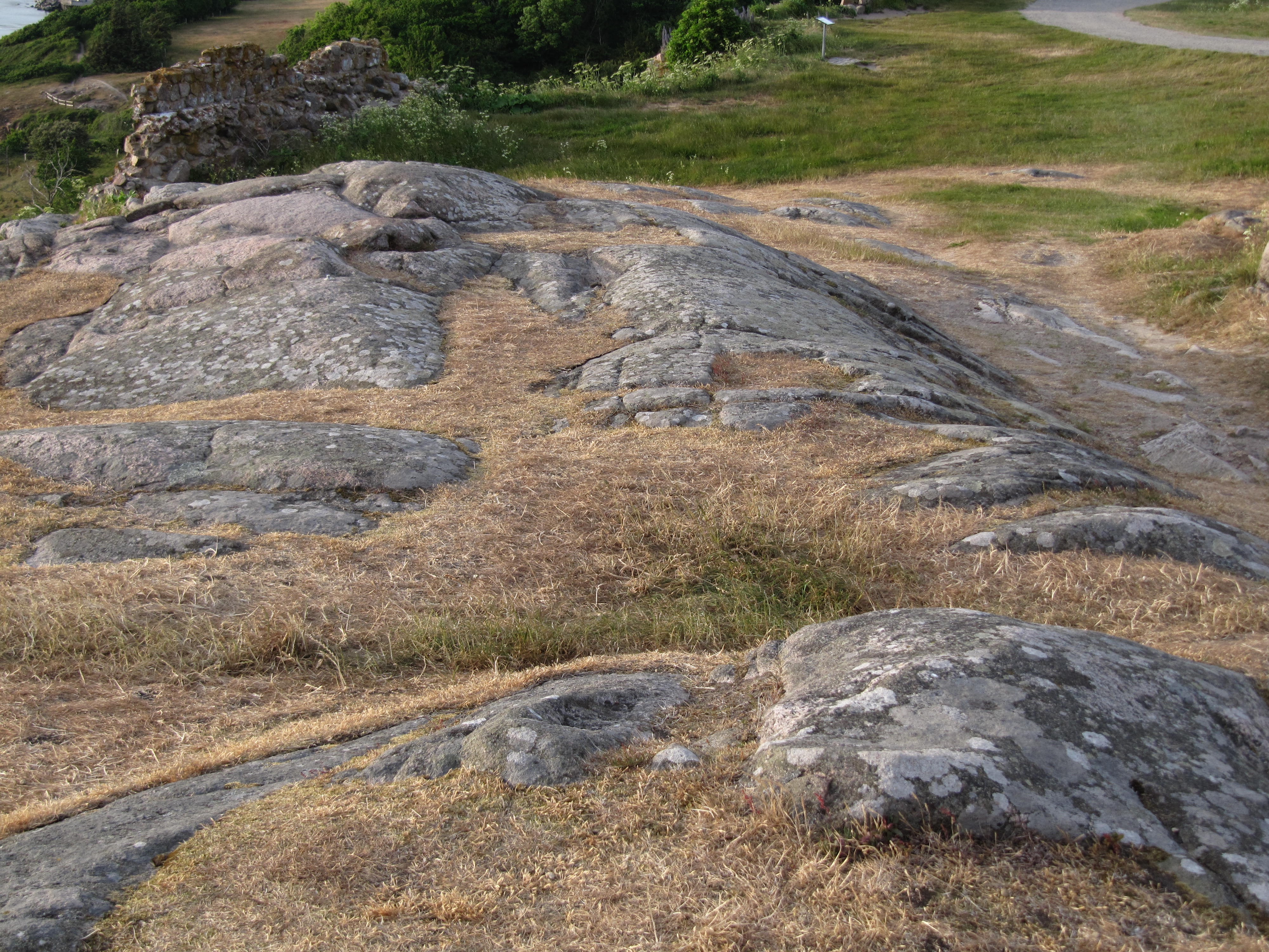 Rundklipper ved Hammershus